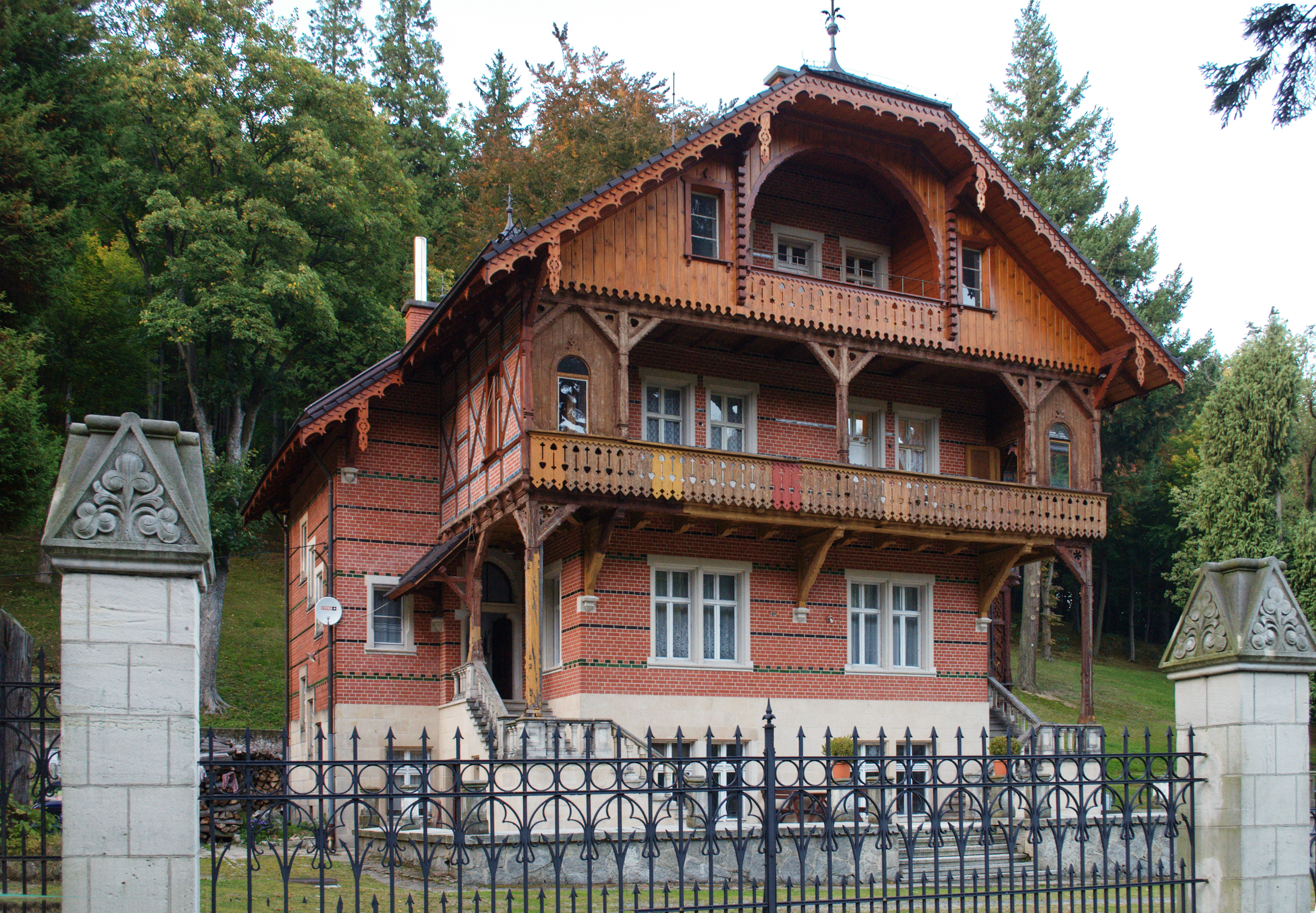 Bielawa, ul. Nowobielawska 89 - dawna willa Dieriga Waldhaus, obecnie pensjonat "Leśny Dworek" (zabytek nr 1364/Wł)